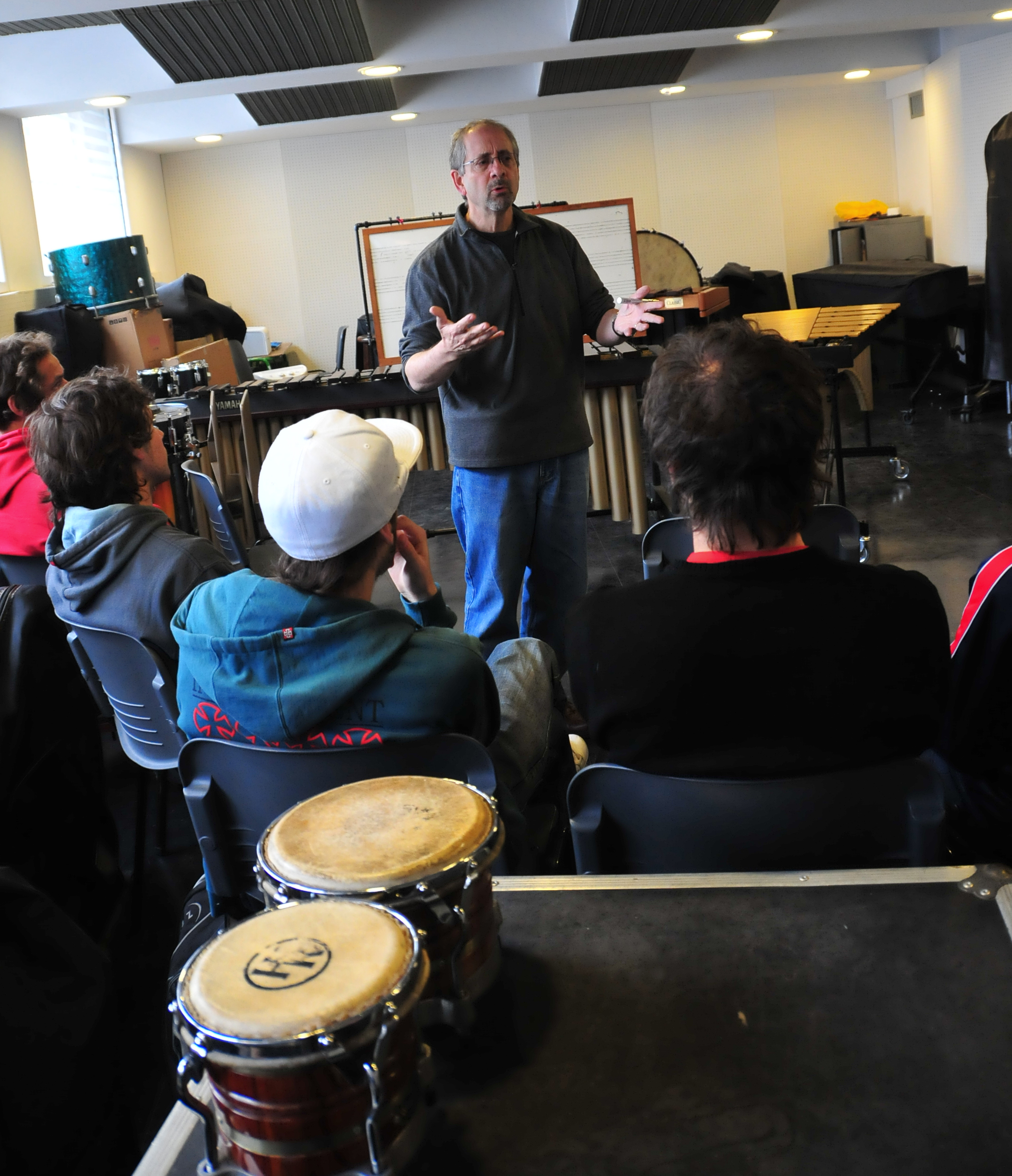 22 de octubre de 2010 - Como parte de su visita al Uruguay, el percusionista estadounidense Dave Samuels brindó hoy una masterclass en la Escuela de Música de Montevideo. El músico se presentará junto a otros artistas invitados en la Sala Zitarrosa el día 23 de octubre en el marco del VI Festival Percusión de Montevideo. [U.S. Embassy photo by Vince Alongi / Copyright info ]